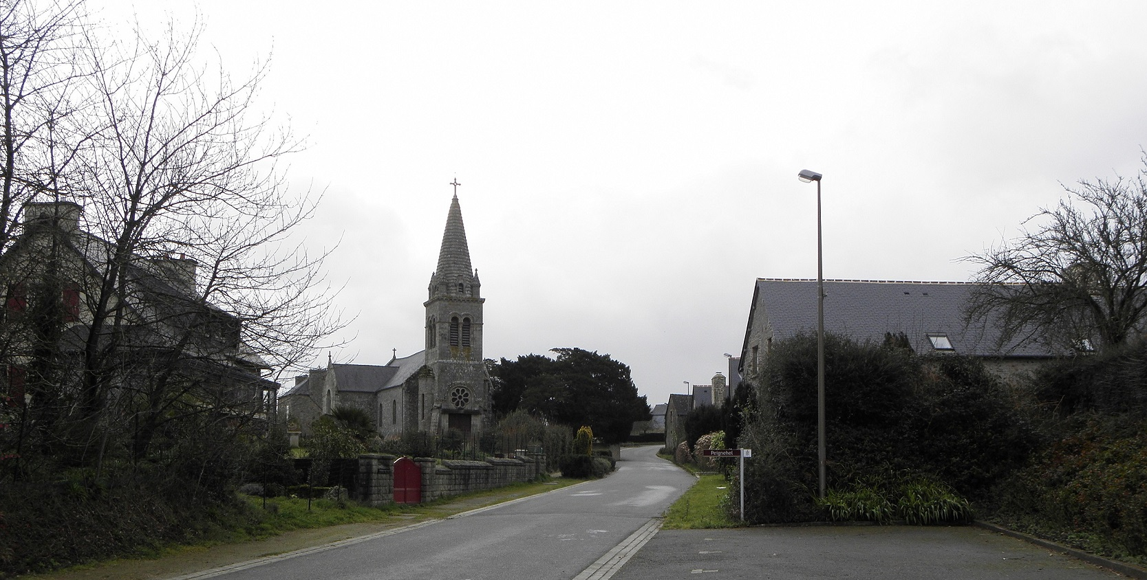 Bourg de saint-Maudez (22).